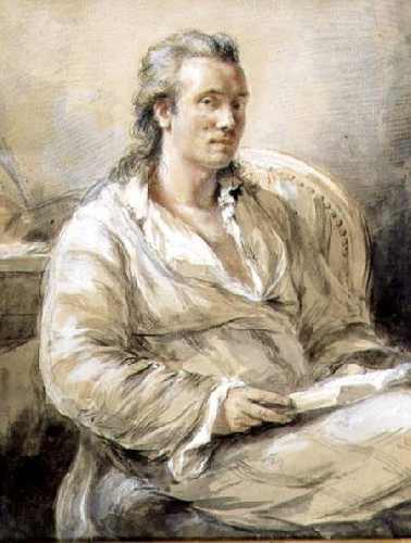 Auto-Portrait